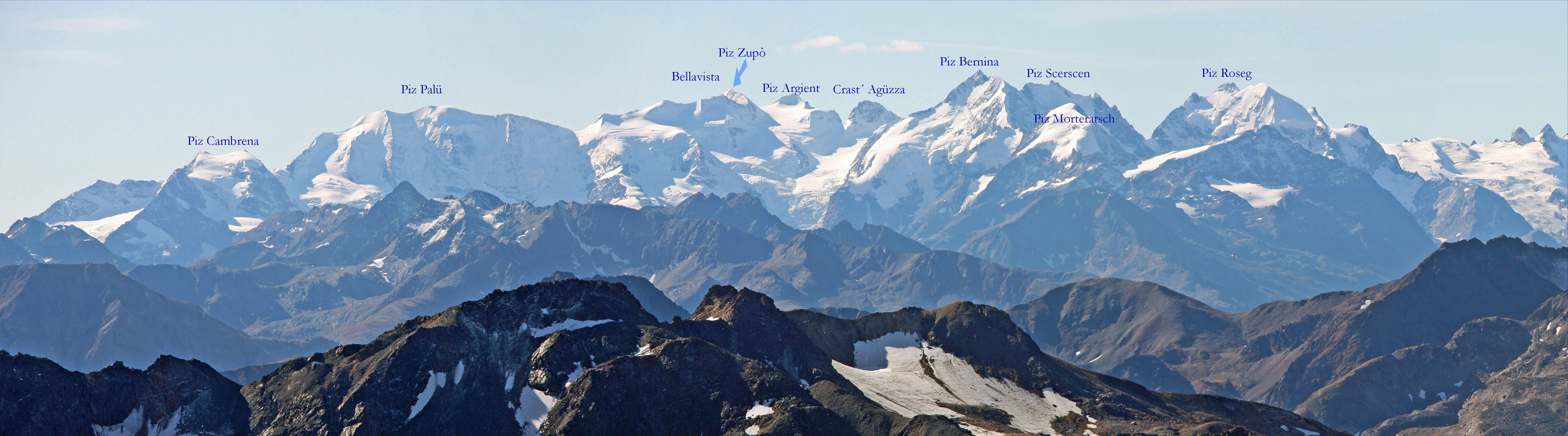 Panorama der Bernina-Gruppe vom Flüela-Schwarzhorn.Entfernung ca.42 Km. Knapp links der Bildmitte gut zu sehen der berühmte Biancograt. Brennweite:(Kleinbild-Äquivalenz) 203mm